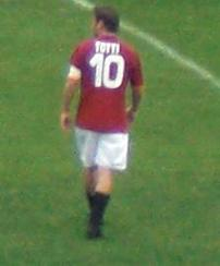 Totti le 19 Avril 2009